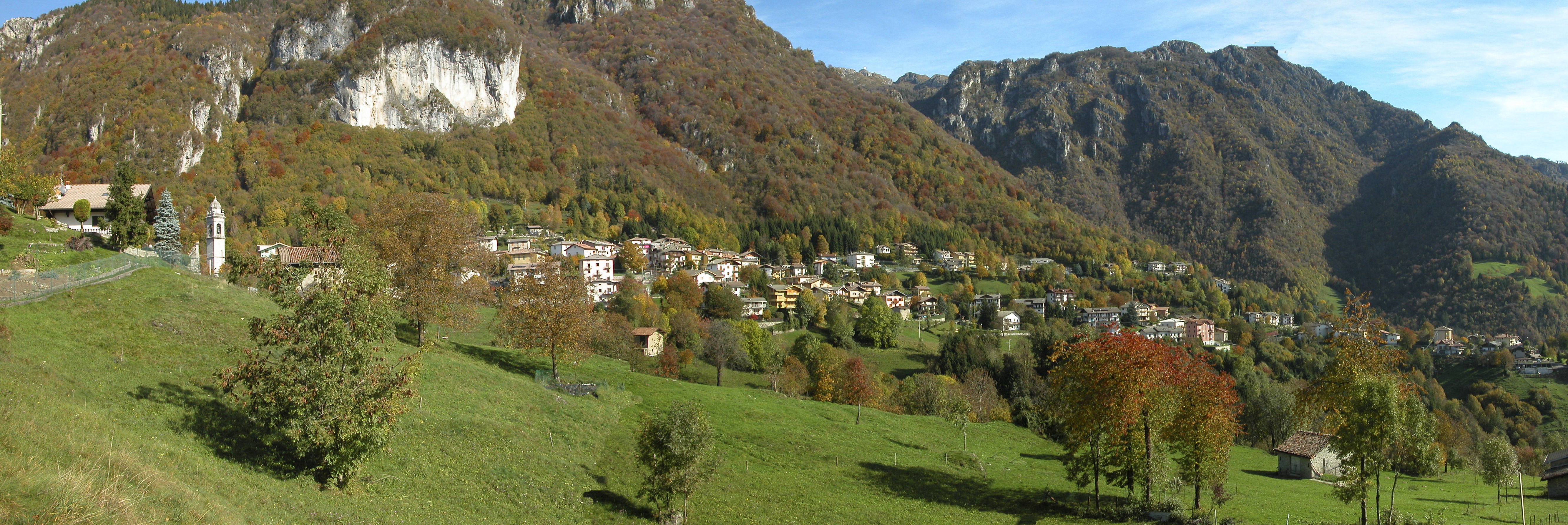 Cornalba, Bergamo, Italia